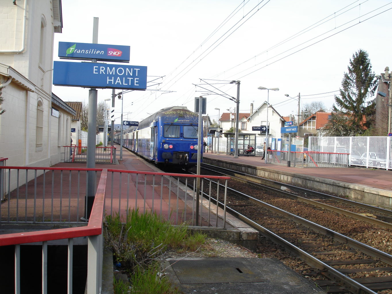 Gare d'Ermont - Halte à Ermont (Val-d'Oise), France